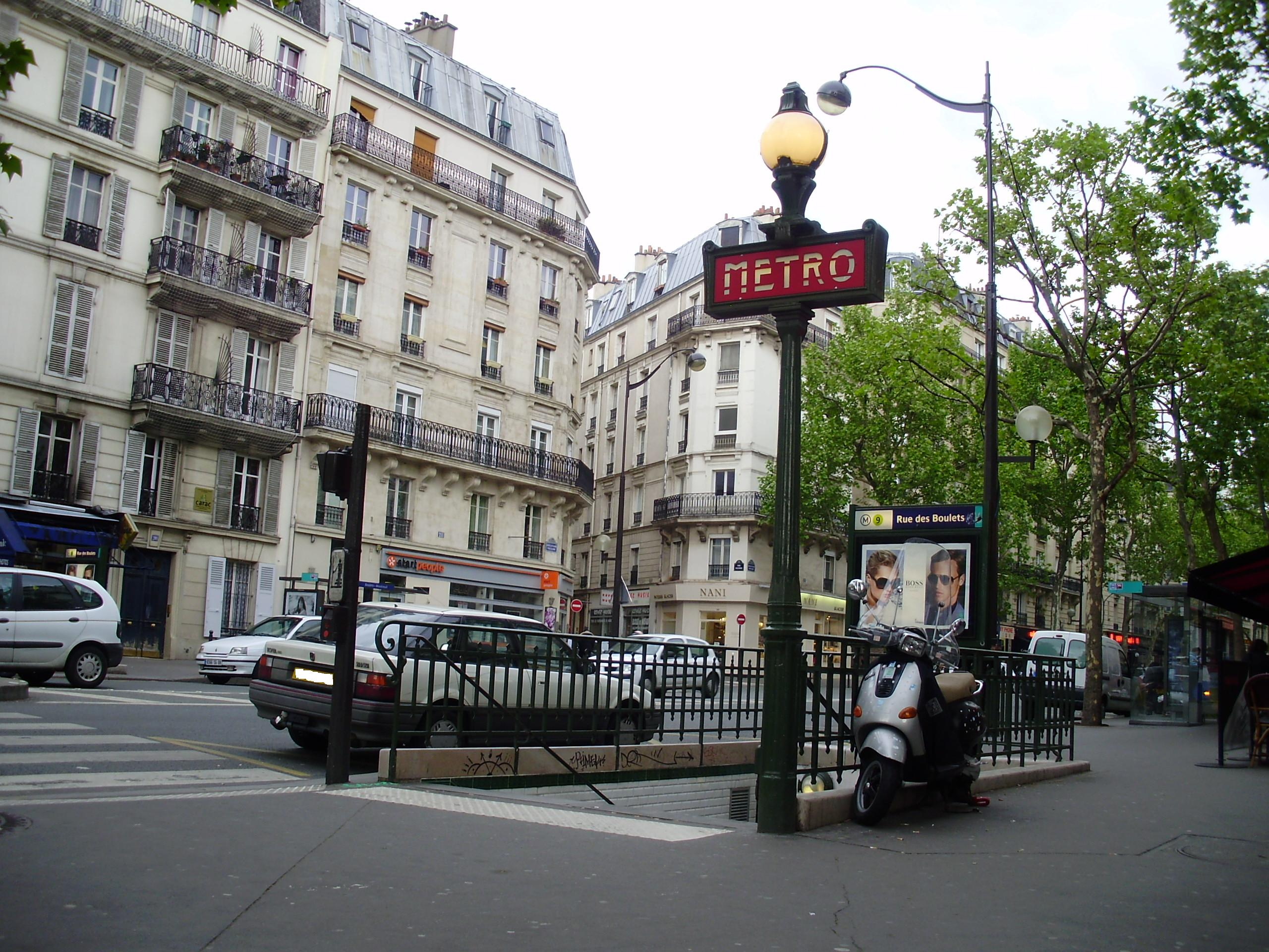 Entrée de la station « Rue des Boulets » du métro de Paris